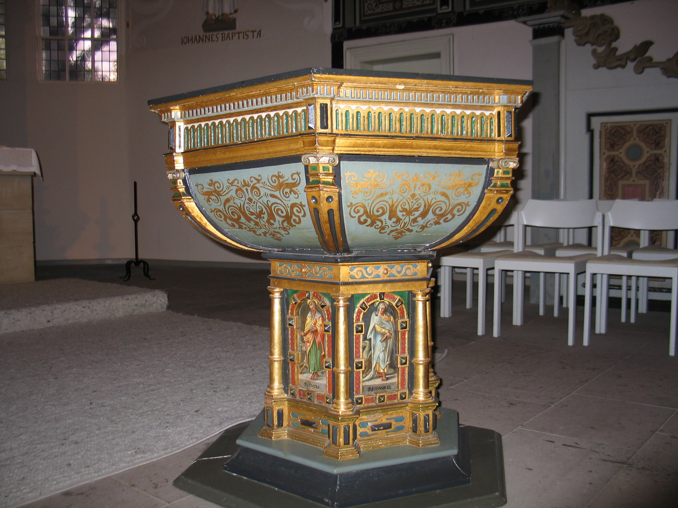 Taufbecken_in-St-Johannis-Kirche (Wolfenbüttel)